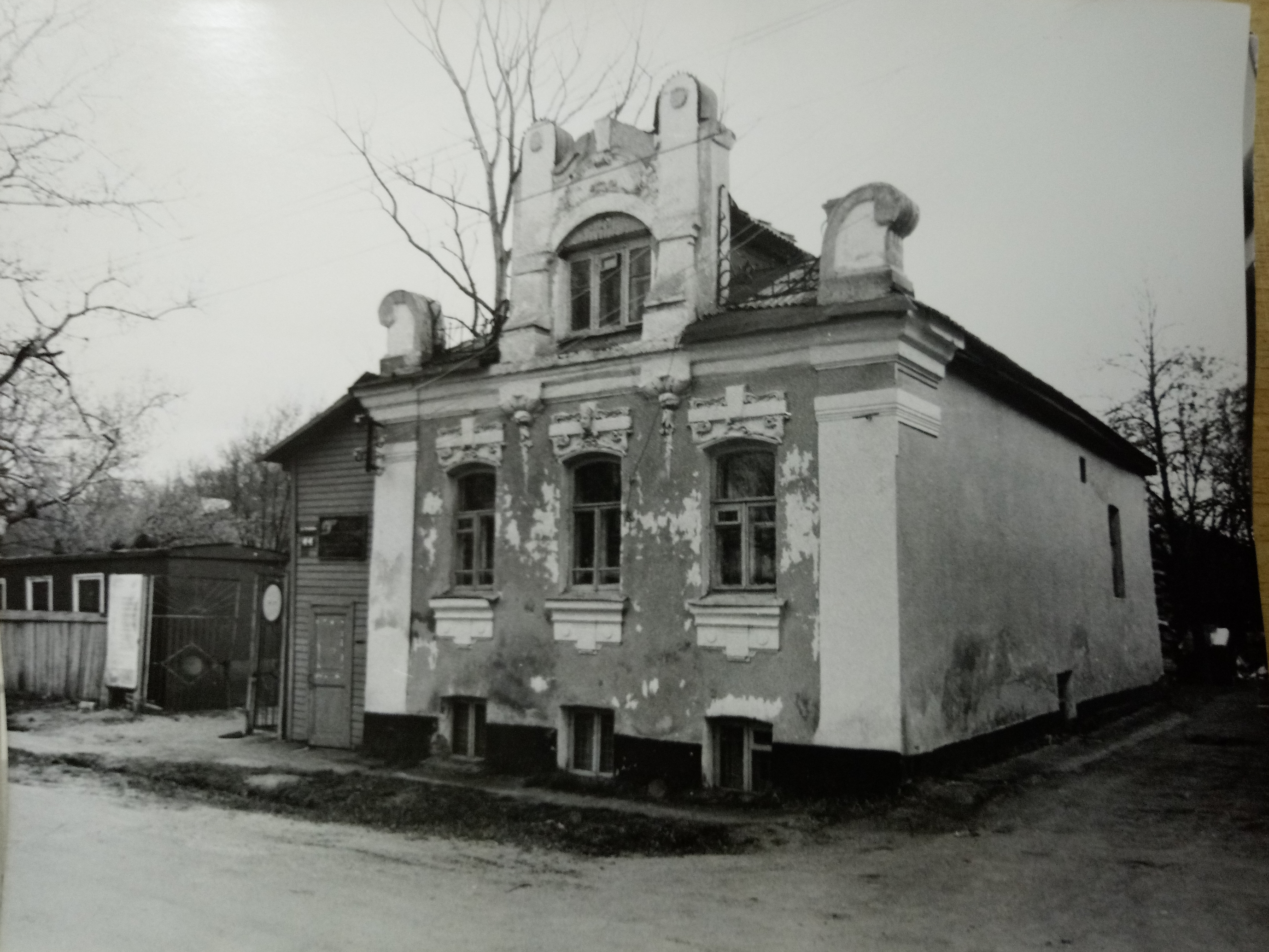 Дом С.И. Мутузова. Фото С.А. Никольского 1988 г.